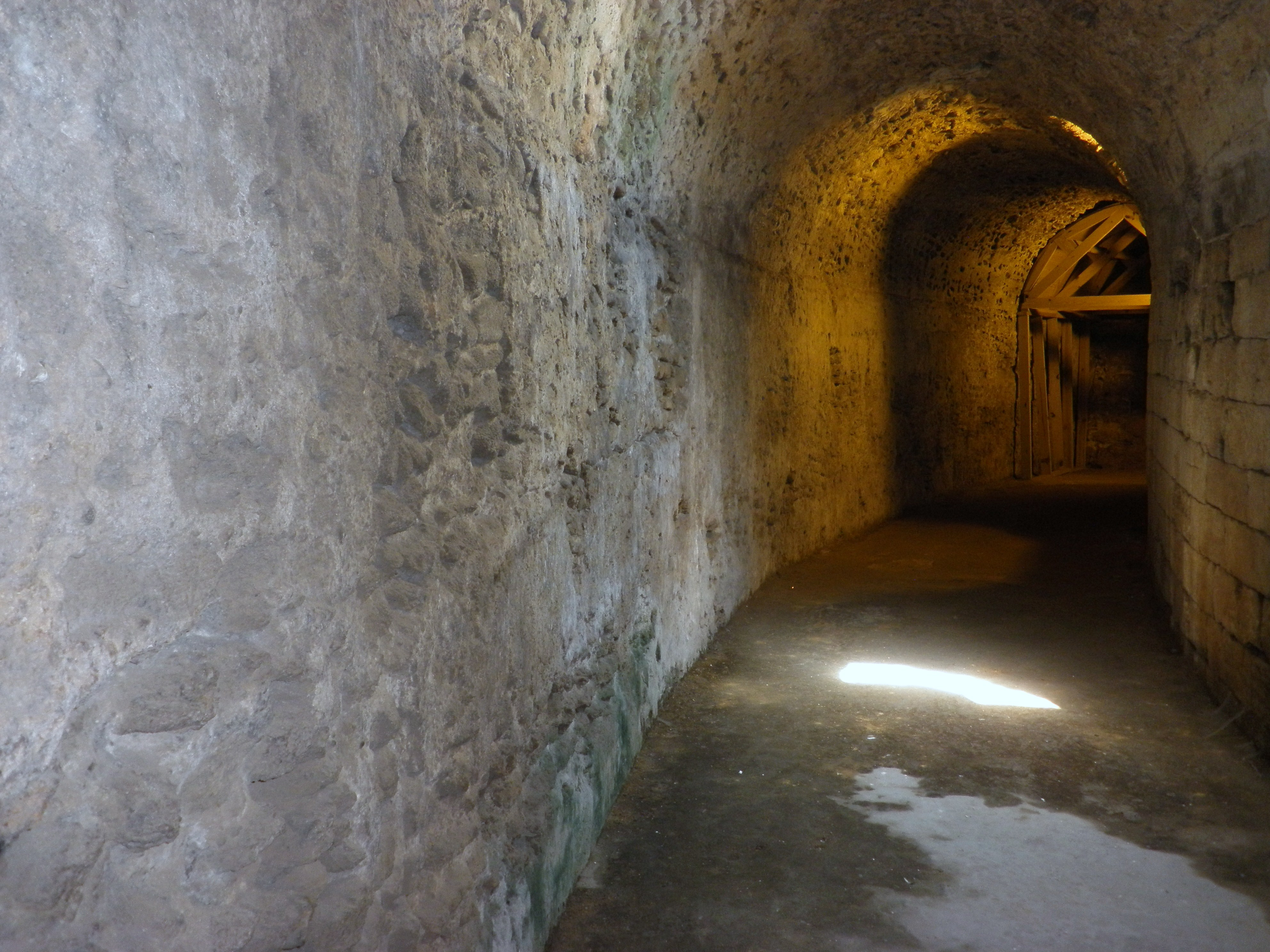 Teatro Romano de Cádiz, España